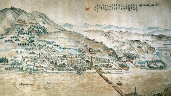 《金城揽胜图》，现藏于甘肃省博物馆。